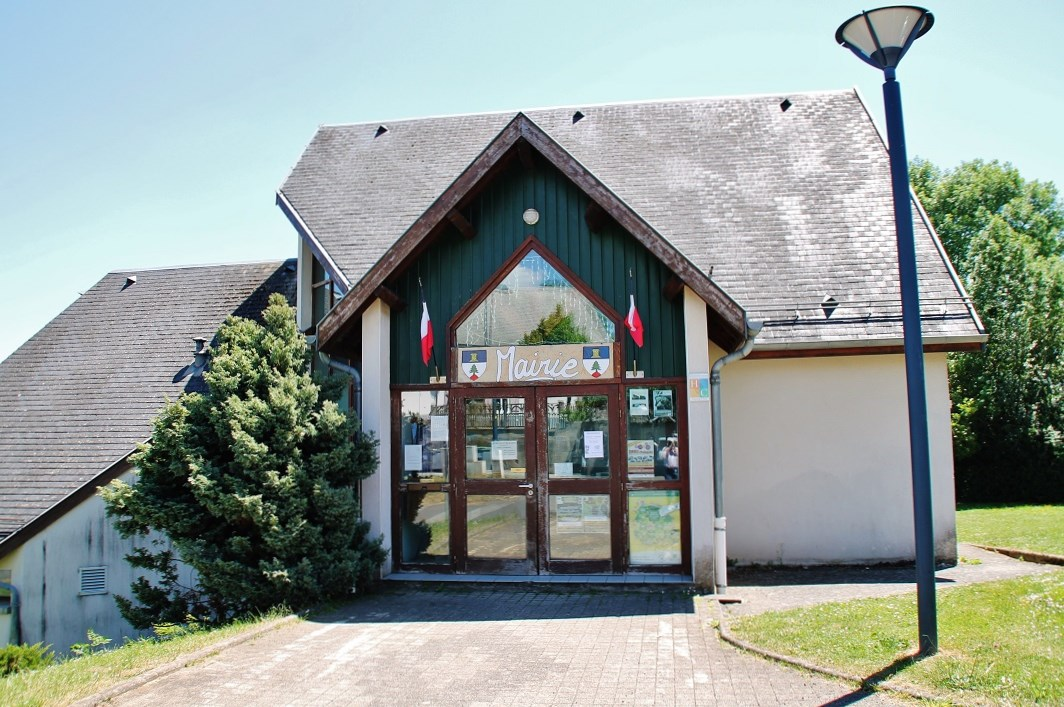 La Mairie